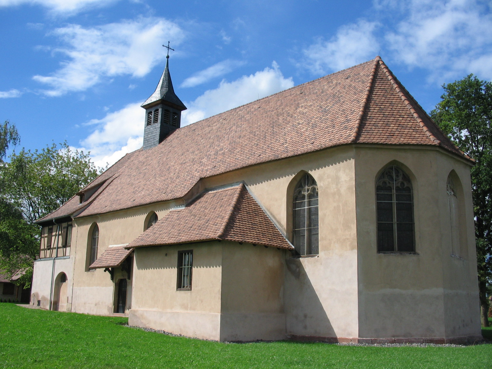 Chapelle Notre-Dame-du-Chêne à Plobsheim XIVe siècle. Vue extérieure